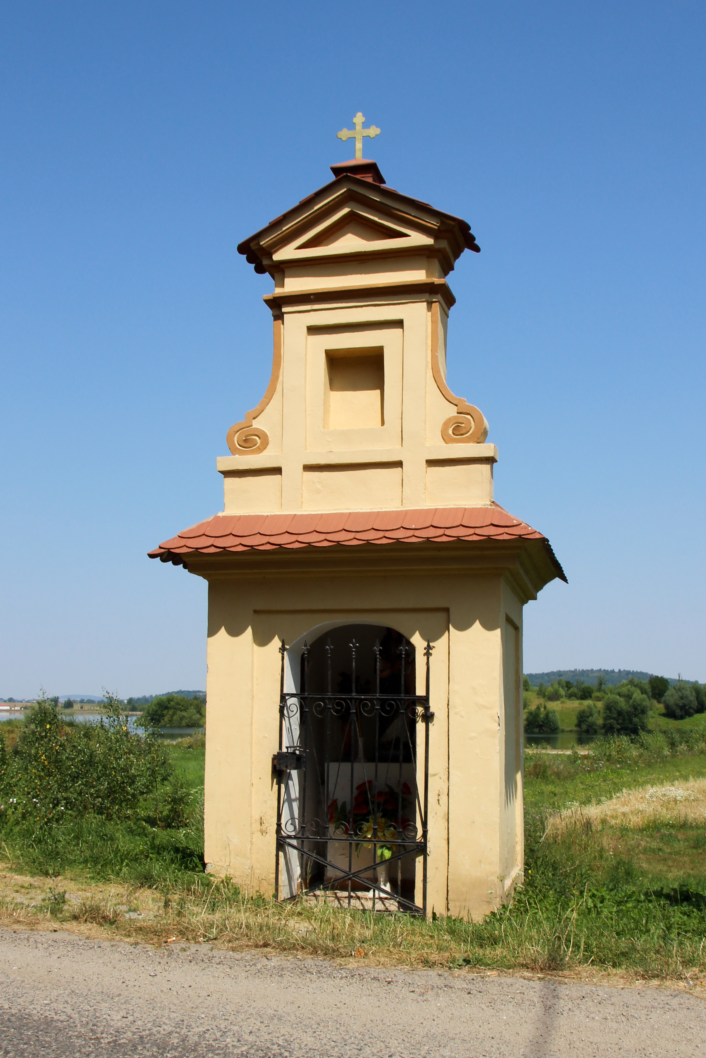 Kozielno – wieś w Polsce, w województwie opolskim, w powiecie nyskim, w gminie Paczków.